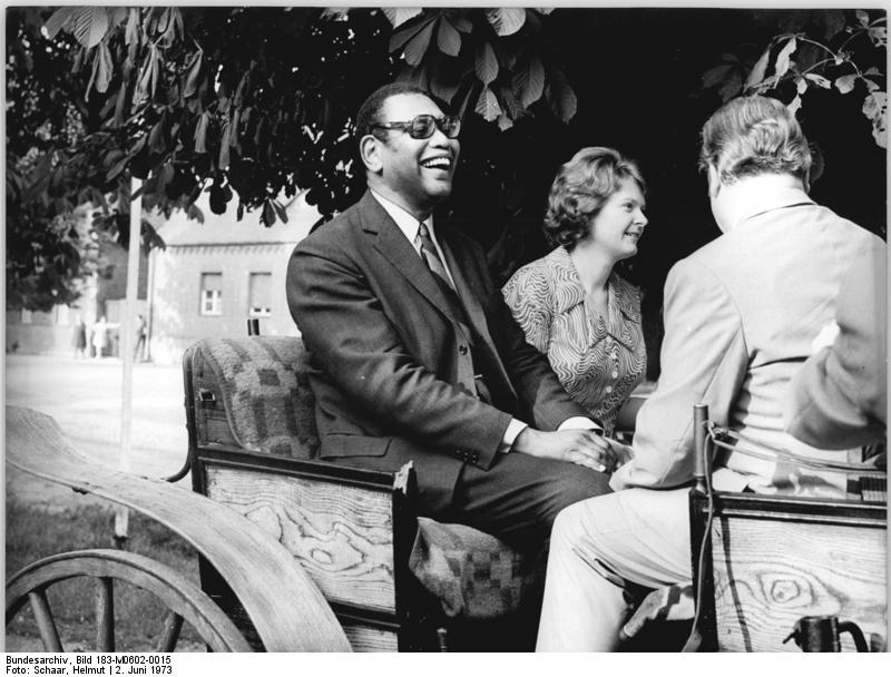 Eutzsch, Besuch durch Philip Potter, Kutschfahrt ADN-ZB Schaar 2.6.73 Bez. Halle: Generalsekretär des Weltrates der Kirchen in Bezirk Halle-Zu Gast in der LPG "Sieg des Sozialismus" in Eutzsch, Kreis Wittenberg, weilte am 1.6.73 der Generalsekretär des Weltrates der Kirchen, Dr. Philip Potter (l.). Begleitet von der LPG-Vorsitzenden, Roswitha Hübner, unternahm er eine Kutschfahrt durch den Ort und die elder der über 2.000 ha umfassenden Genossenschaft und überzeugte sich im Bildungszentrum, in Wohnungen und in der Kinderkrippe von den beeindruckenden sozialen Veränderungen, die der Sozialismus für die Landbevölkerung brachte. (siehe ADN-Meldung)